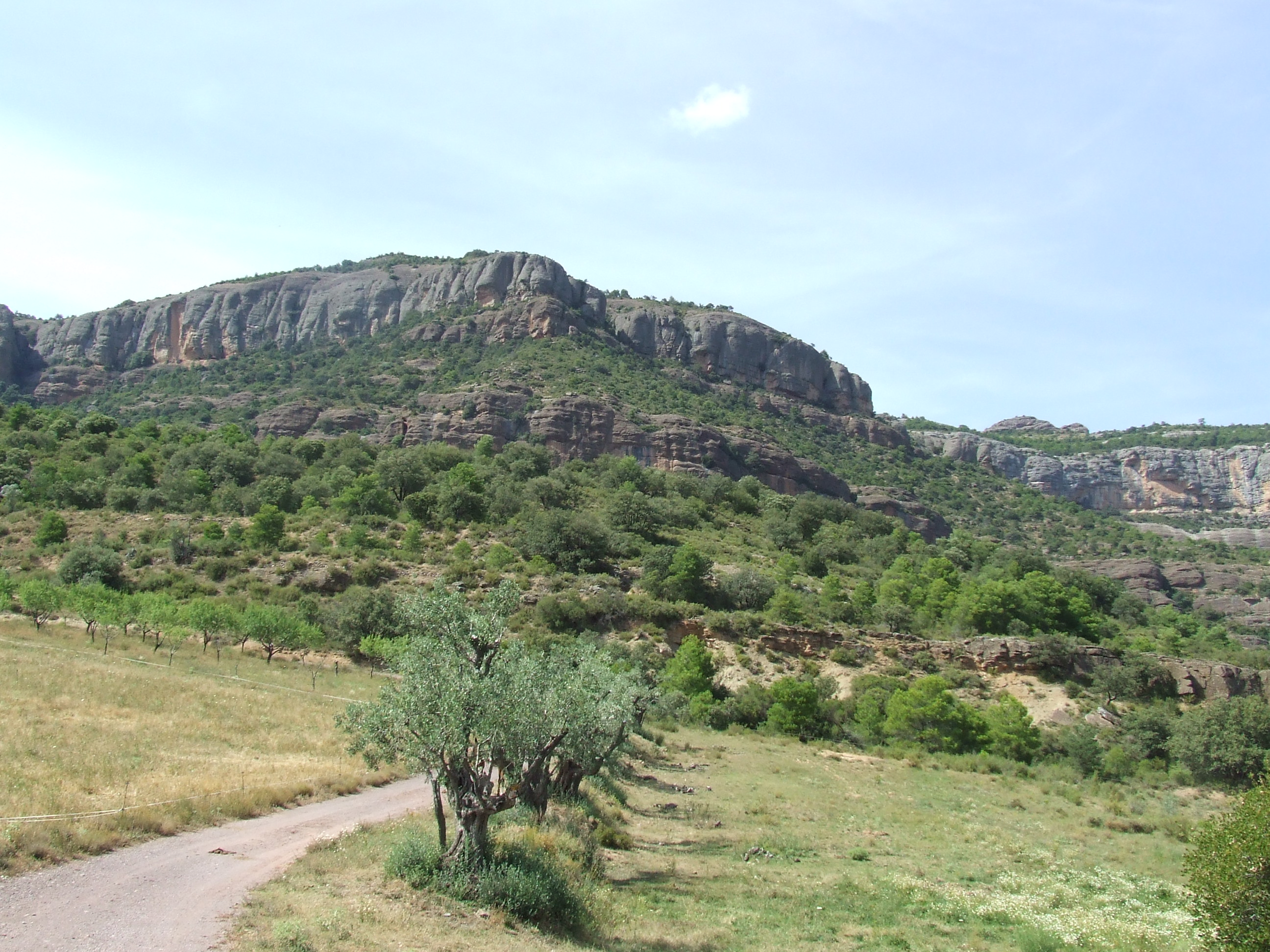 El Tossal de la Vinya, de Gramuntill (la Pobla de Segur, Pallars Jussà)